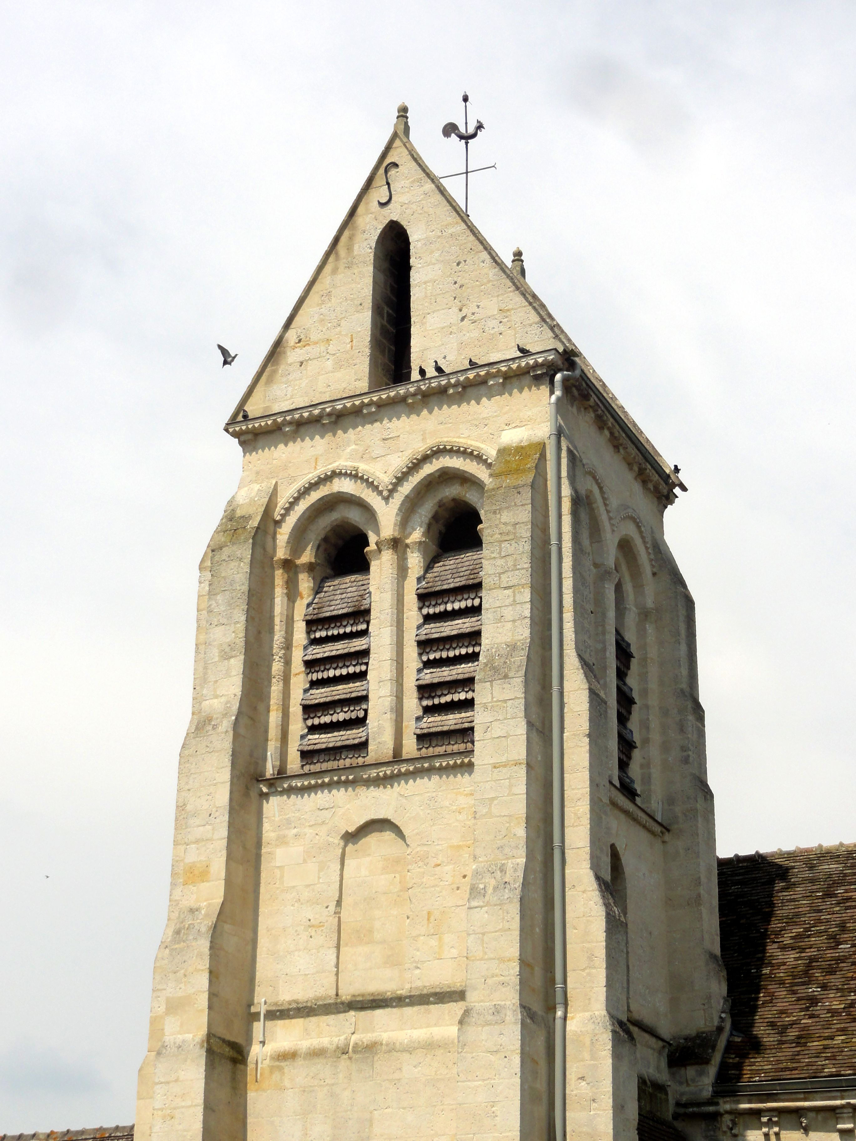 Clocher.